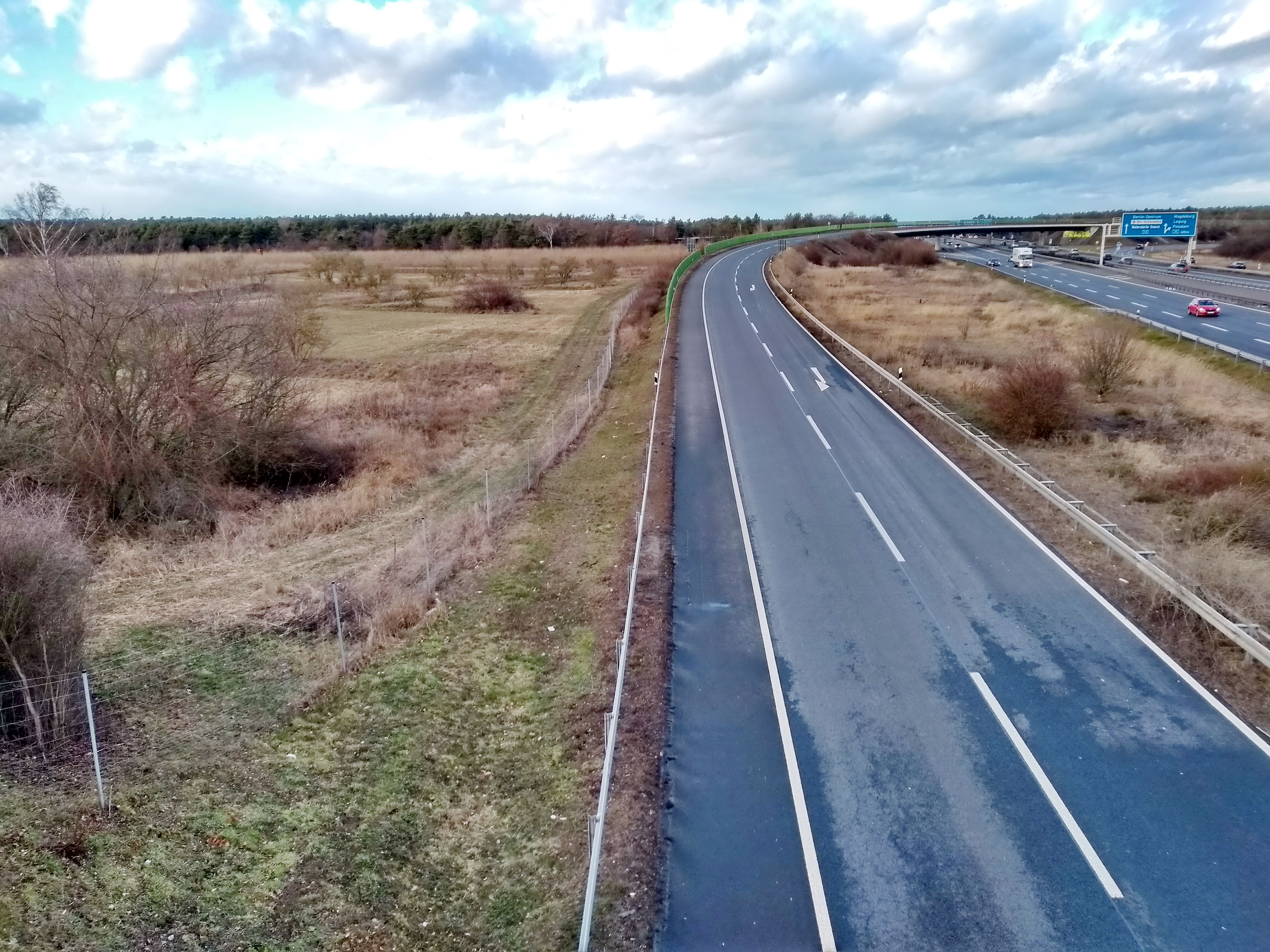 Rieselfelder des Stadtgutes Deutsch Wusterhausen beidseitig der Bundesautobahn 13, südlich des Schönefelder Kreuzes